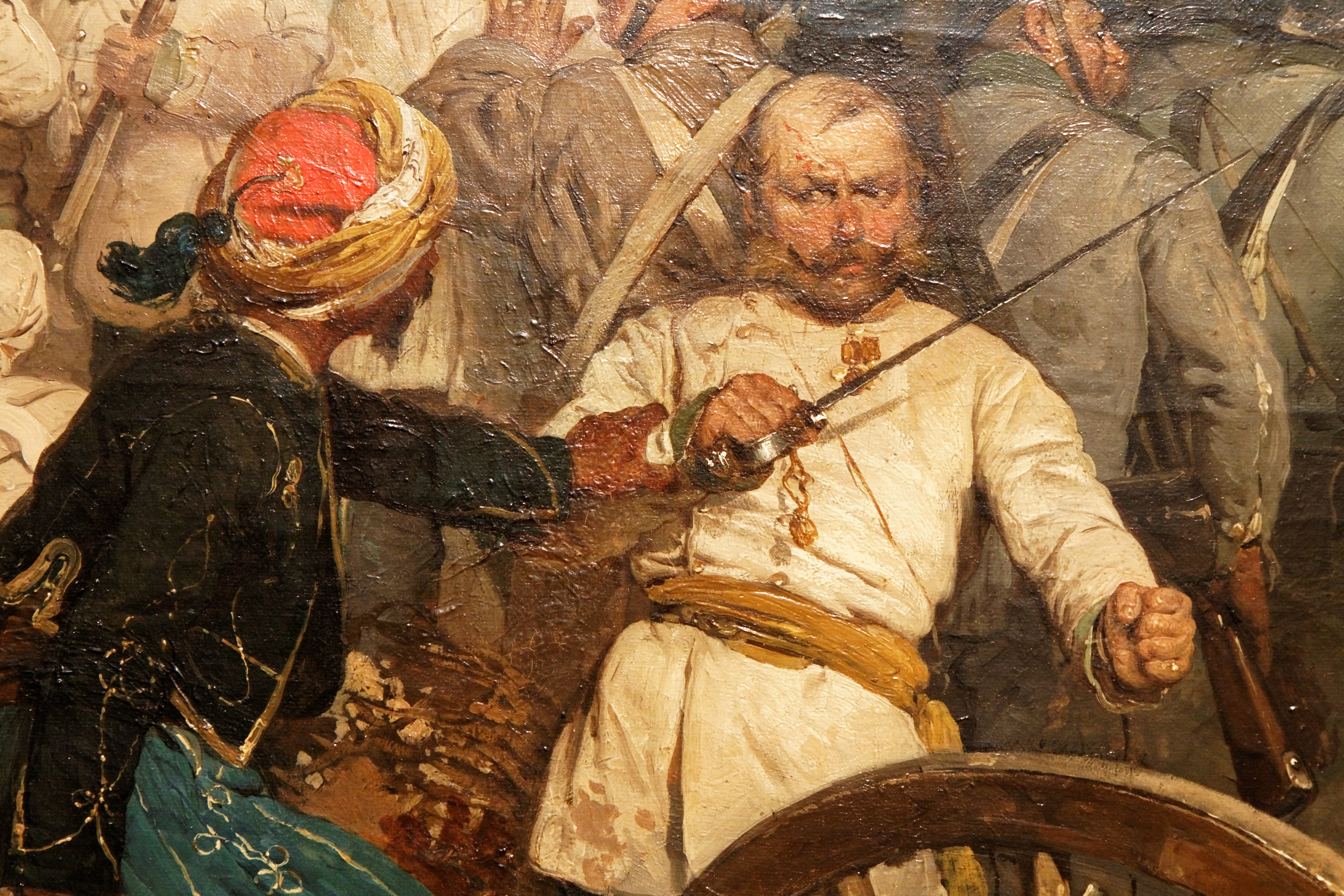 LA bataille de Magenta par Gerolamo Induno.